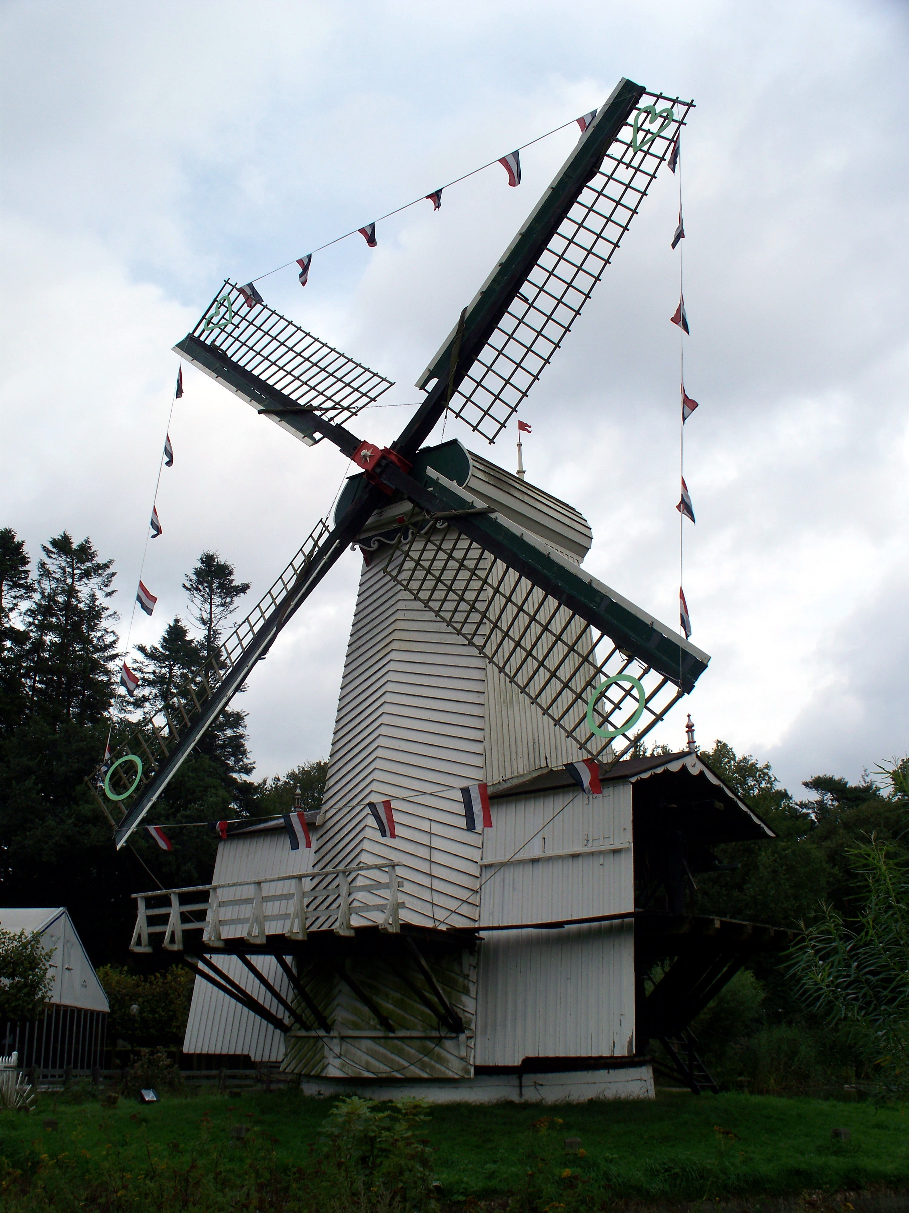 Windmolen "Mijn Genoegen" in Openluchtmuseum Arnhem